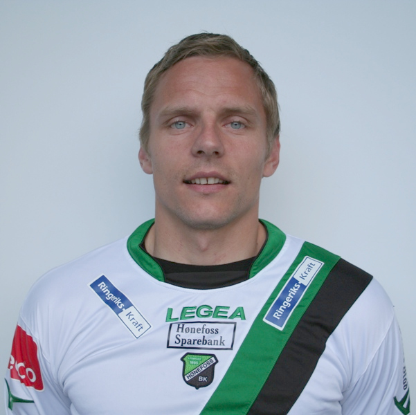 Kristjan Ørn Sigurdsson, islandsk fotballspiller som spiller for Hønefoss Ballklubb.